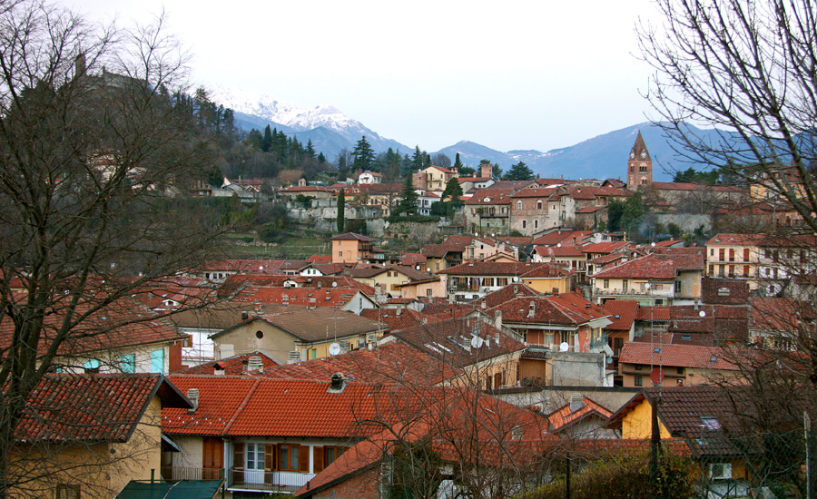 Panorama del centro storico di Avigliana (TO) dalla chiesa di San Pietro